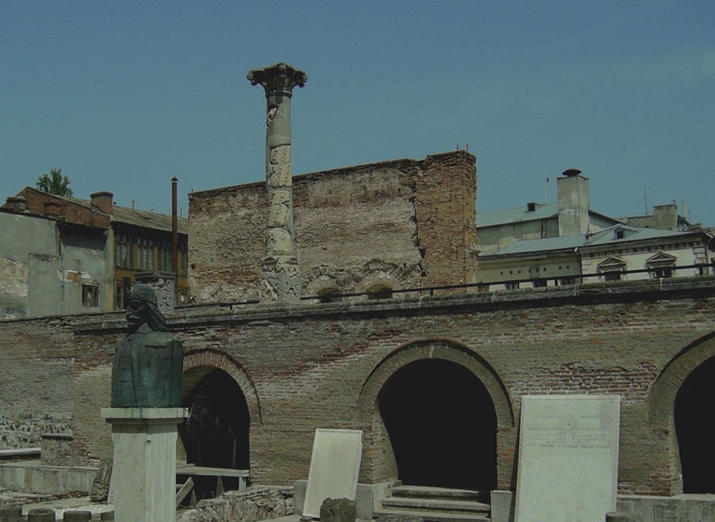 Bukarest, Curtea Veche (Rumänien)